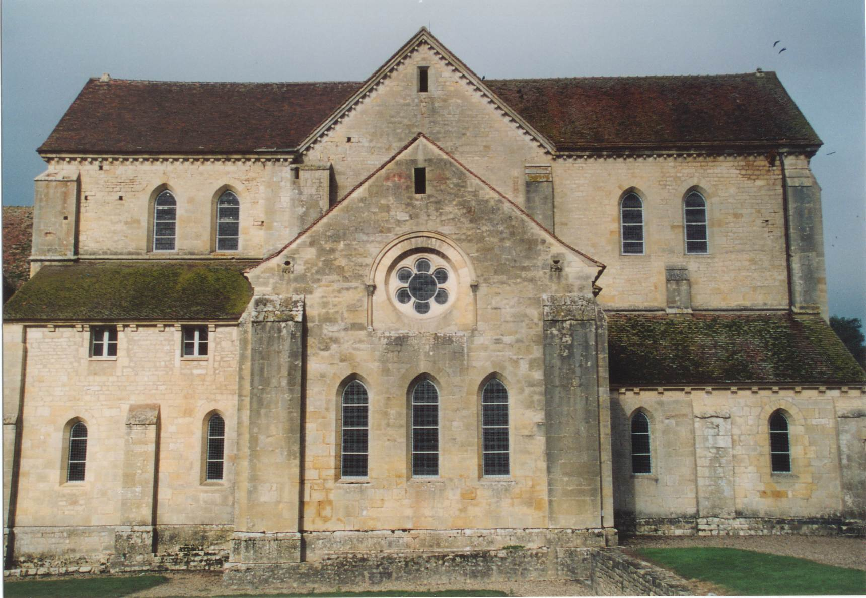 Abbaye de Noirlac